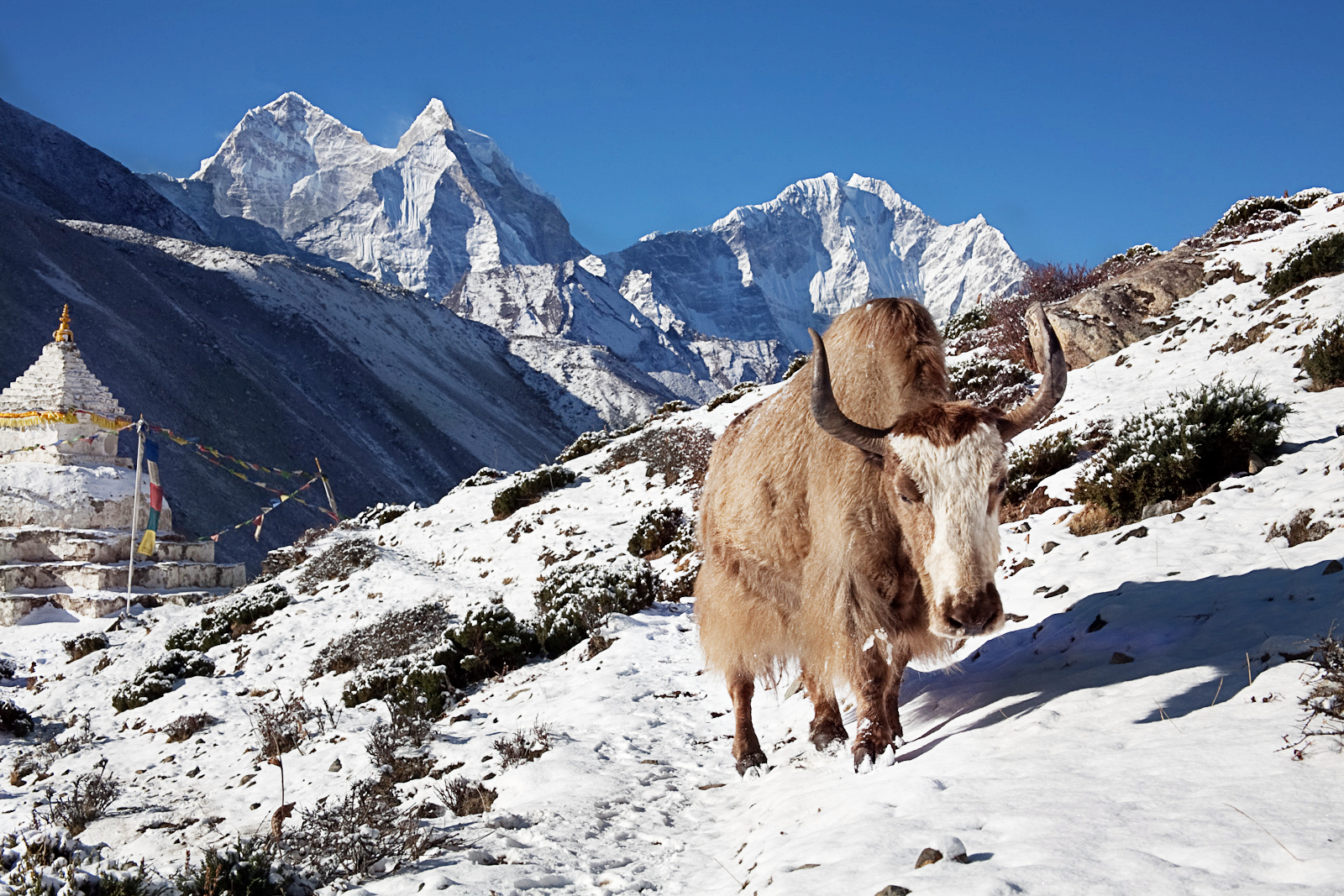 A yak in Nepal.